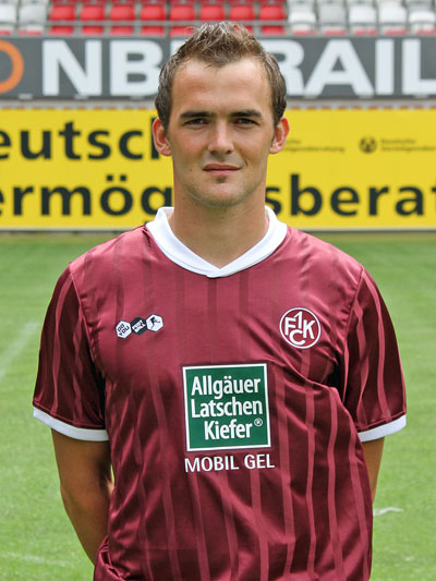 Erwin "Jimmy" Hoffer, österreichischer Fußballspieler